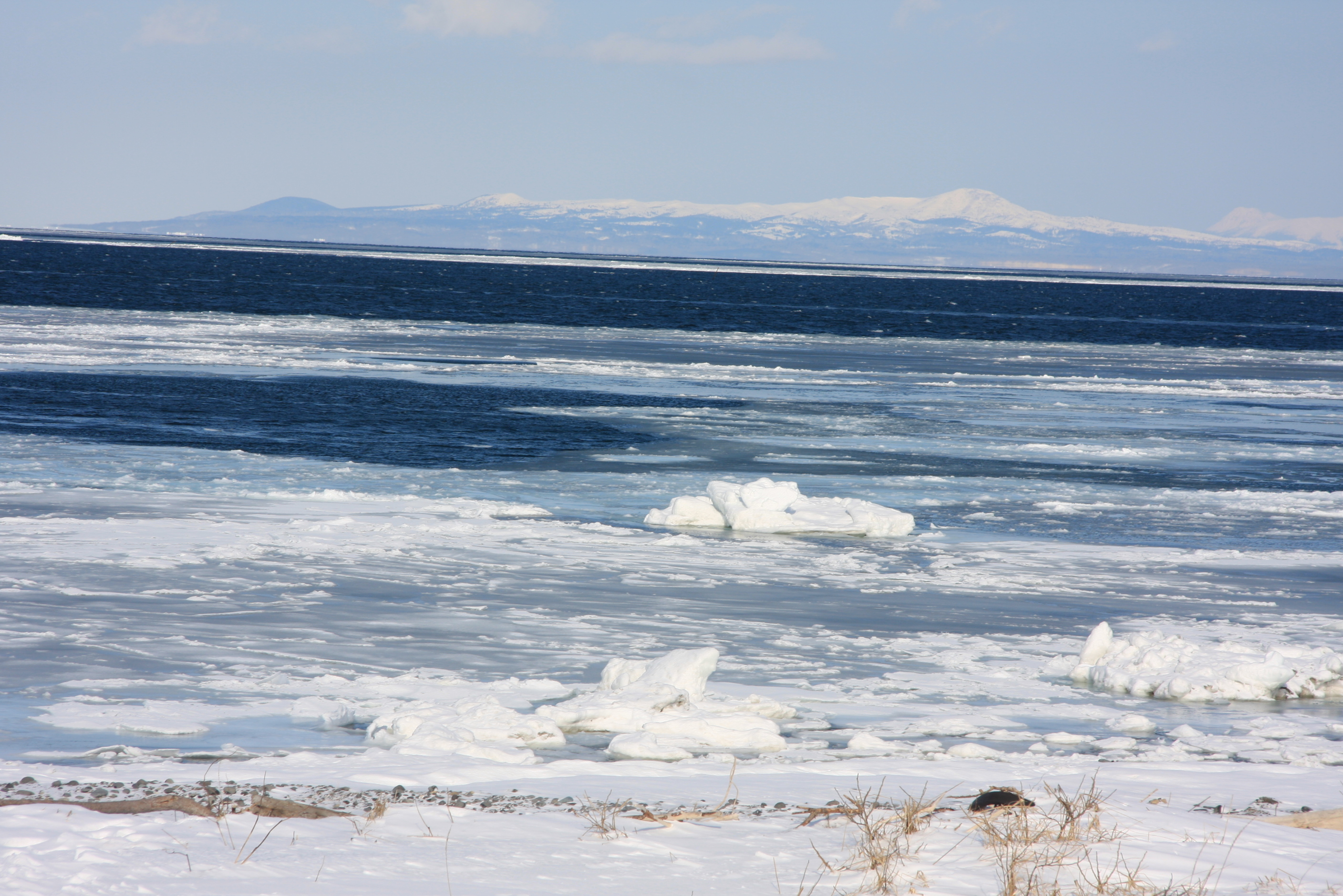 野付半島より望む国後島の泊山